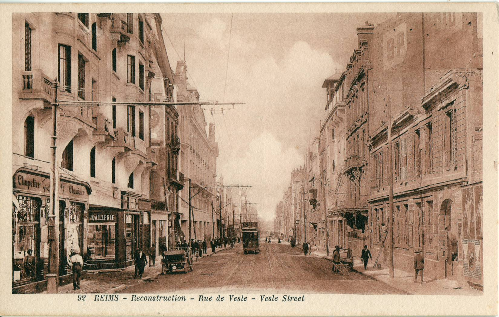 Carte postale ancienne éditée par Baudet, éditeur à Reims, n°92 REIMS - Reconstruction - Rue de Vesle - Versle Street